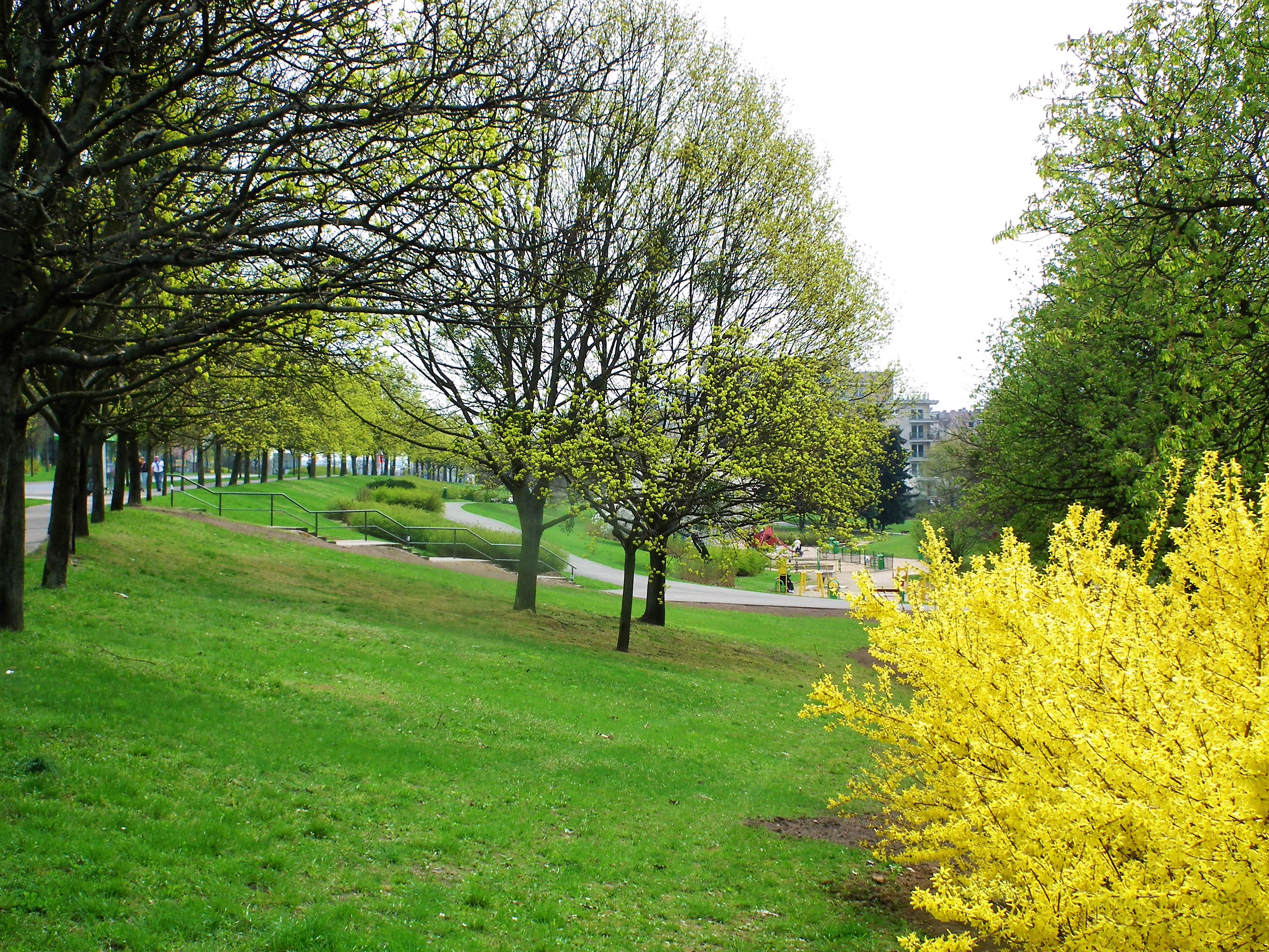 Park Gagarina w Poznaniu.